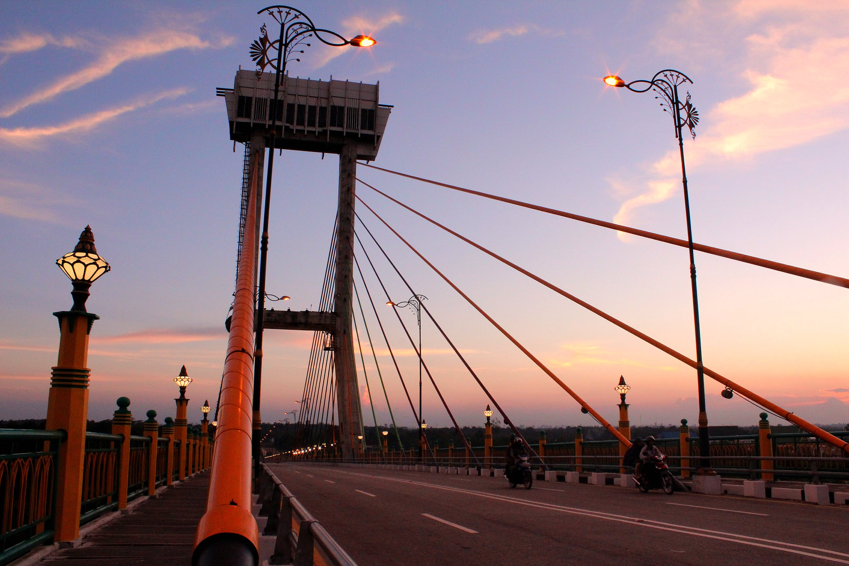 Jembatan Tengku Agung Sultanah Latifah